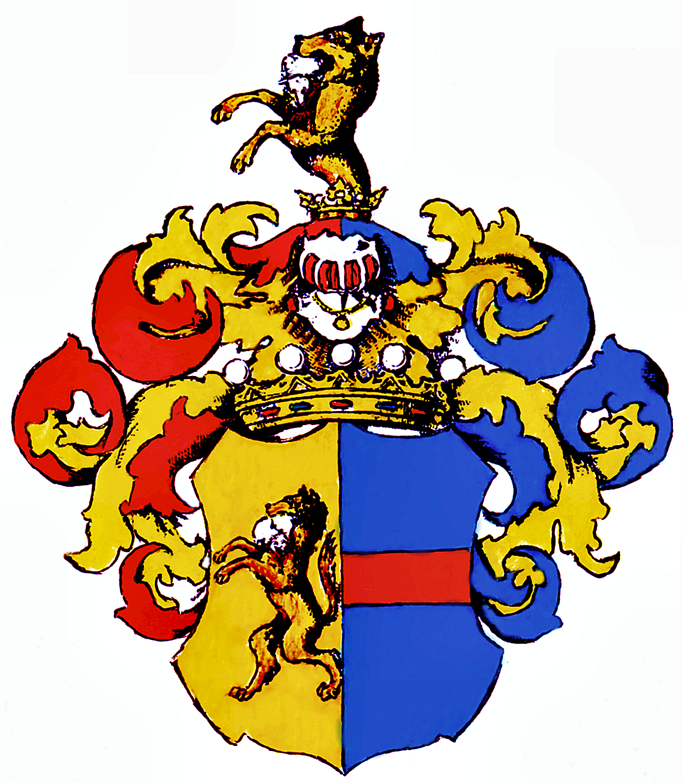 Wappen der Freiherrn von Wiedersperg 1760, 1872 und 1881